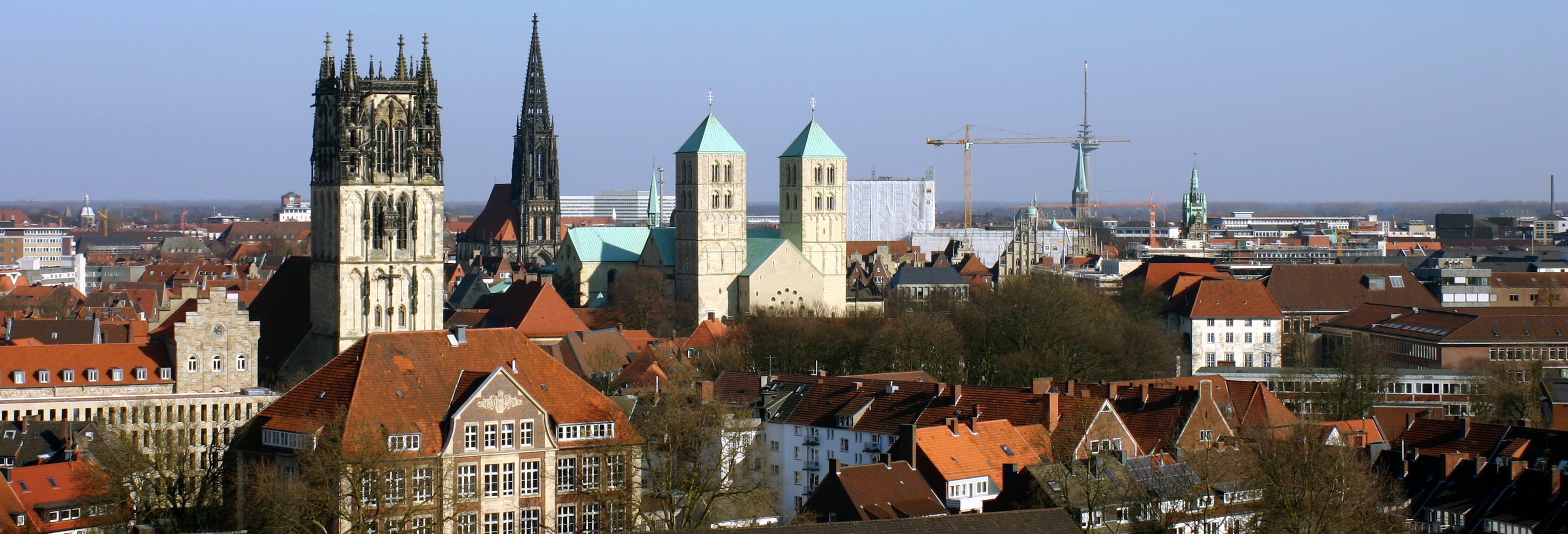 Münster, Blick auf die Innenstadt